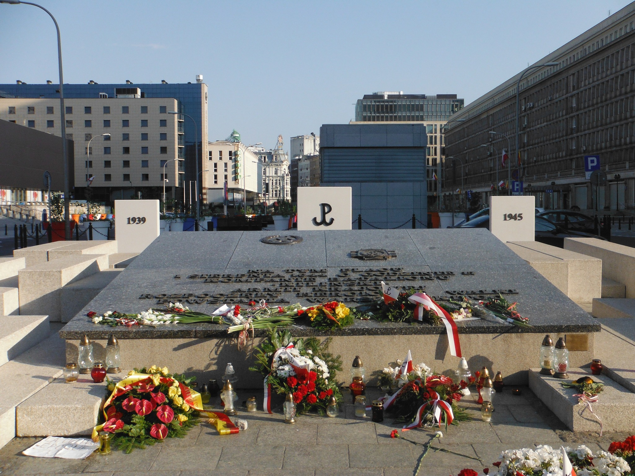 Pomnik Powstania Warszawskiego na pl. Powstańców Warszawy w Warszawie.